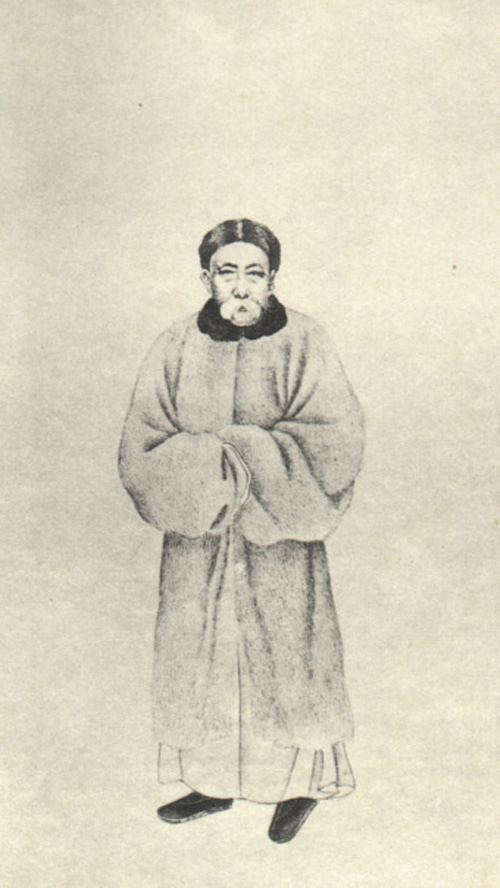 清代学者。